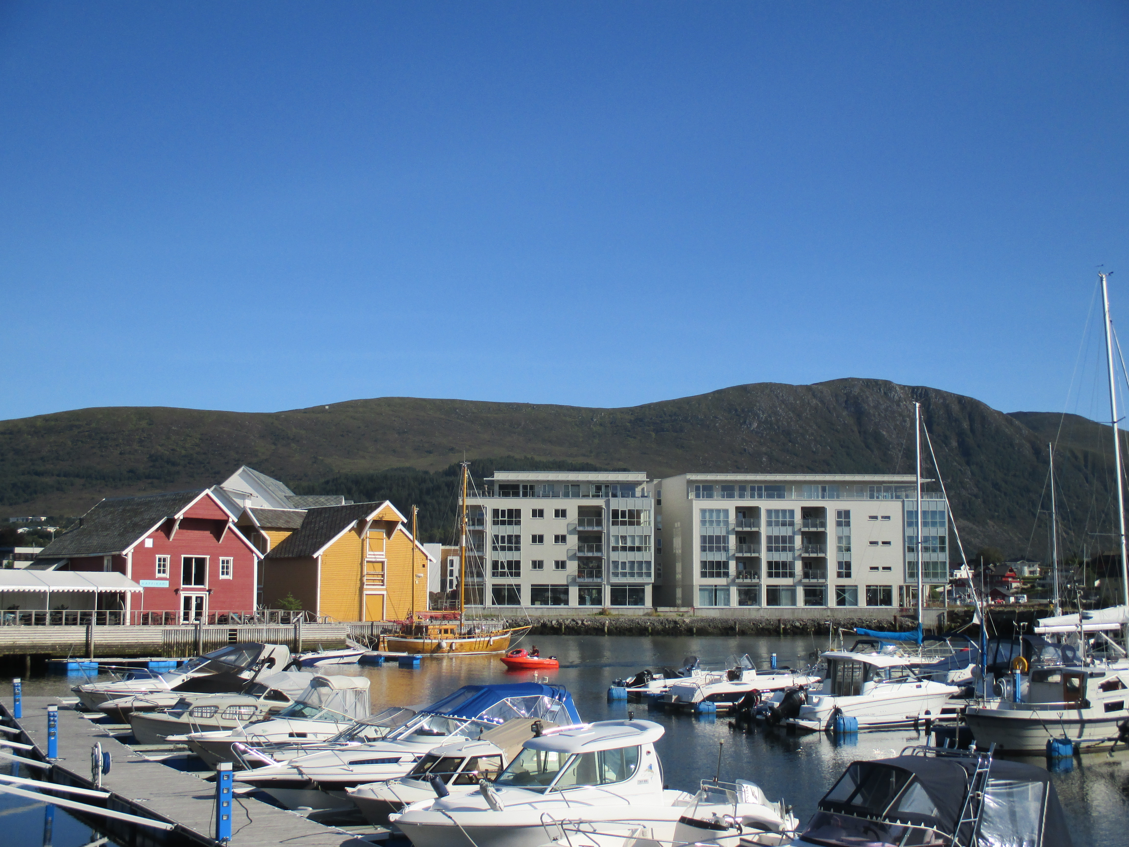 Fra Ulsteinvik